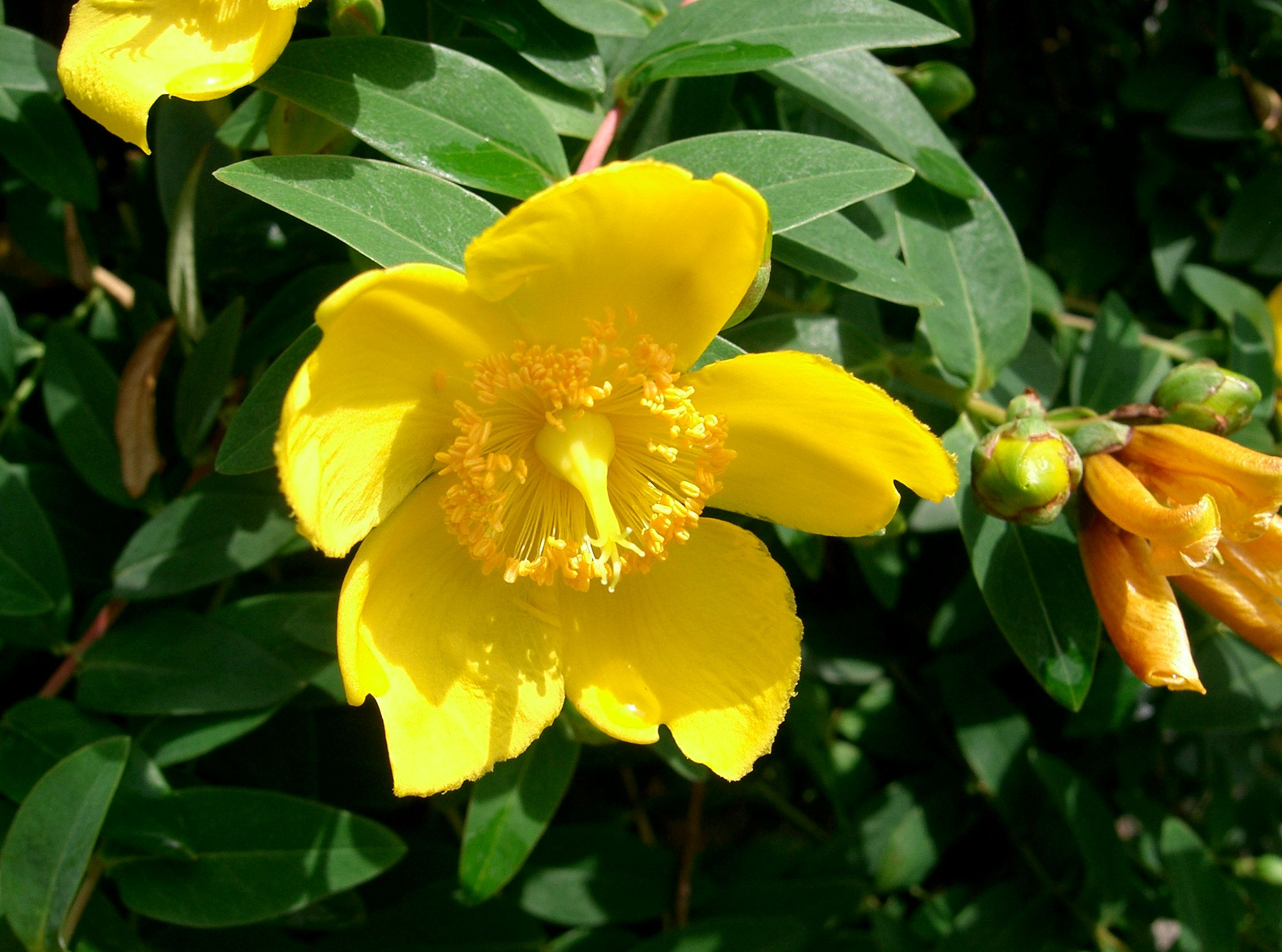 Hypericum patulum